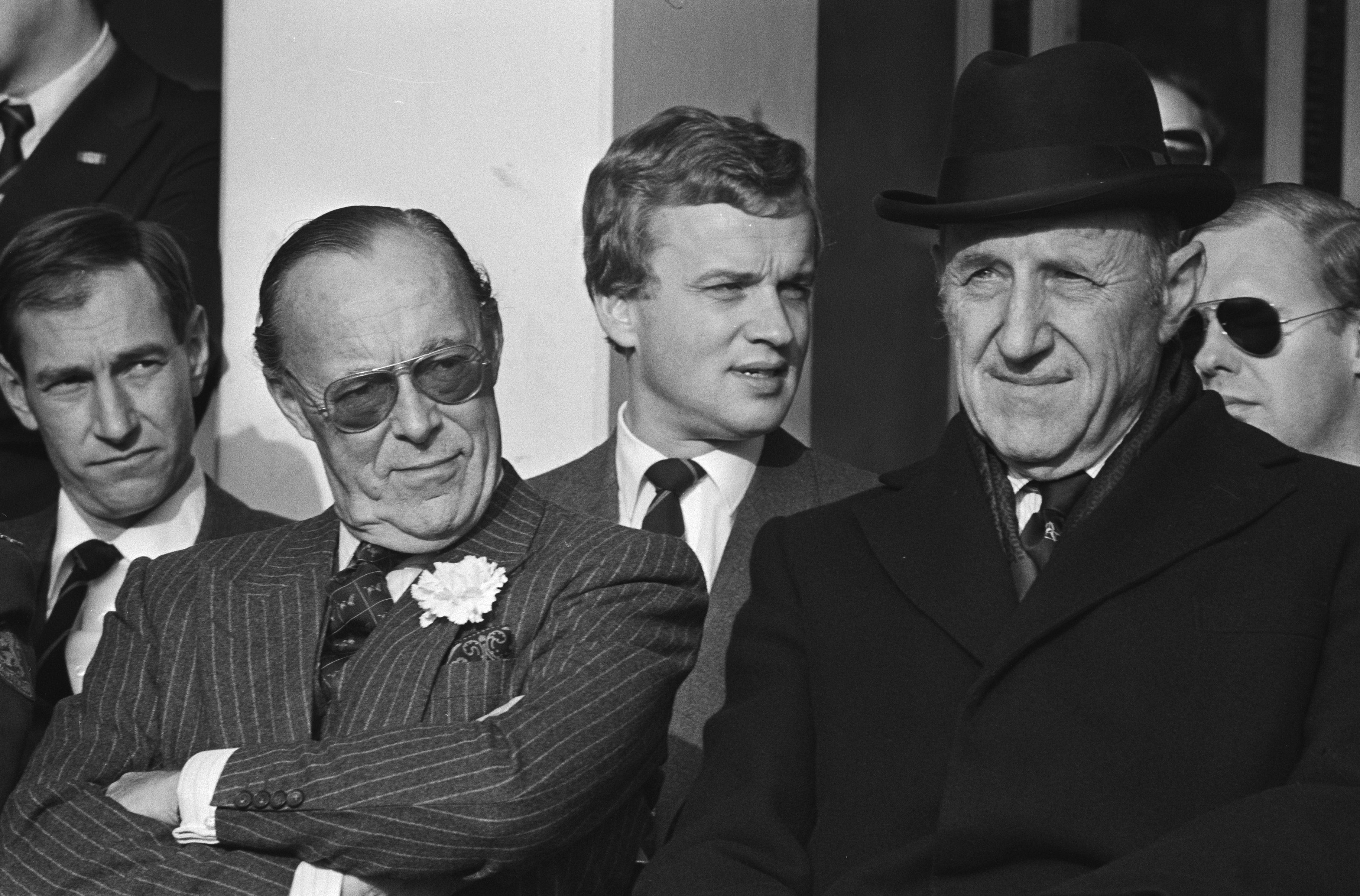 Collectie / Archief : Fotocollectie Anefo Reportage / Serie : [ onbekend ] Beschrijving : In A'dam Prins Bernhard i.v.m. 100-jarig bestaan Koninklijke Studentenschietvereniging defile van alle studentenweerbaarheden Datum : 31 oktober 1980 Locatie : Amsterdam, Noord-Holland Trefwoorden : Defiles Persoonsnaam : Bernhard (prins Nederland), Luns, J.A.M.H., Luns, Joseph Fotograaf : Croes, Rob C. / Anefo Auteursrechthebbende : Nationaal Archief Materiaalsoort : Negatief (zwart/wit) Nummer archiefinventaris : bekijk toegang 2.24.01.05 Bestanddeelnummer : 931-1216